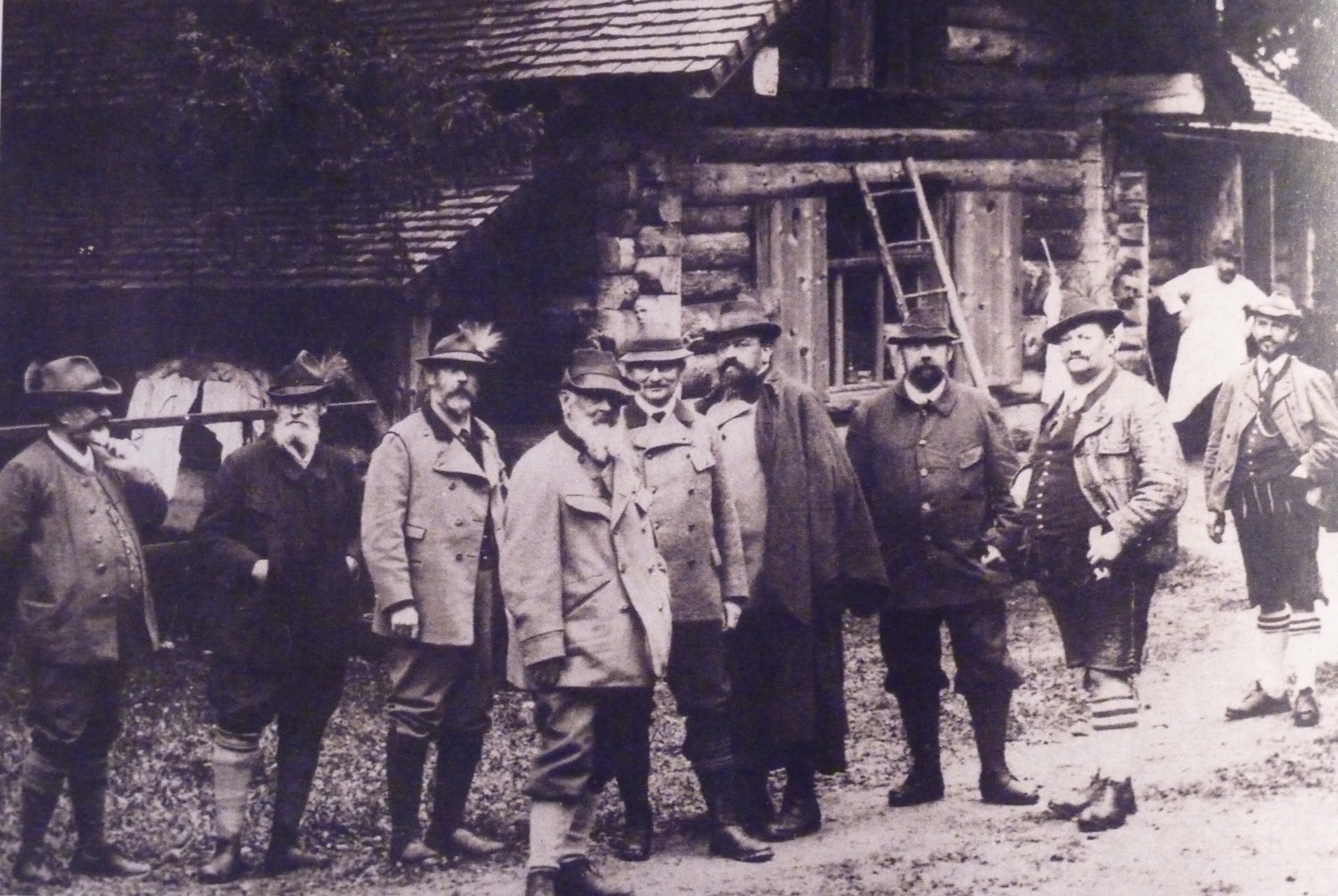 Prinzregent Luitpold und Jagdgefolge bei seiner Jagdhütte (Nähe Giebelhaus, Ostrachtal)